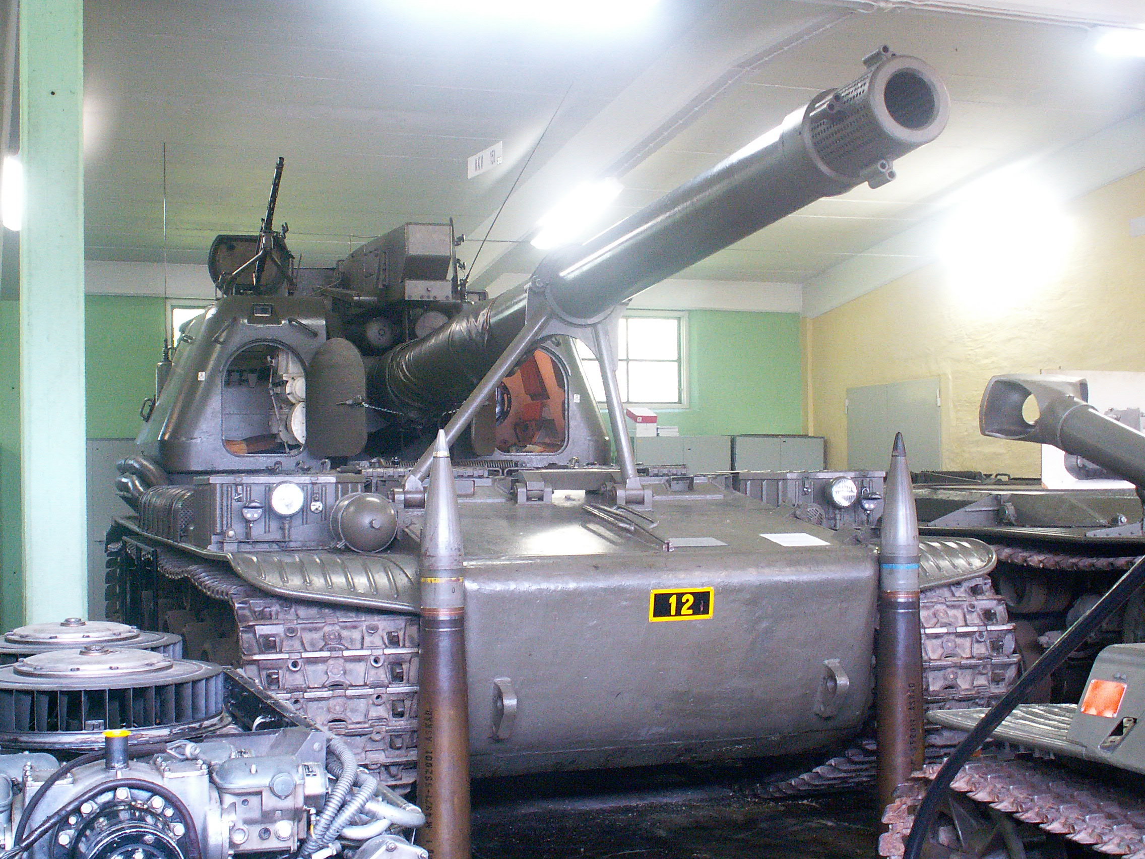 Haubits i Pansarmuseet, Axvall